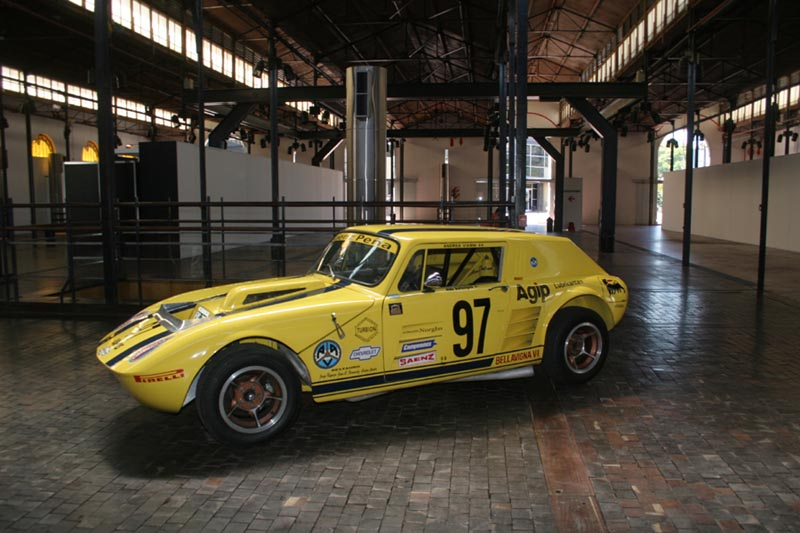 La siguiente es una fotografía del prototipo conocido como La Garrafa. La misma fué tomada por Cholo Cano, fotografo de Argentina y publicada en su sitio web: La misma fué solicitada para su publicación en Wikipedia como lo exigen las leyes de Copyright.